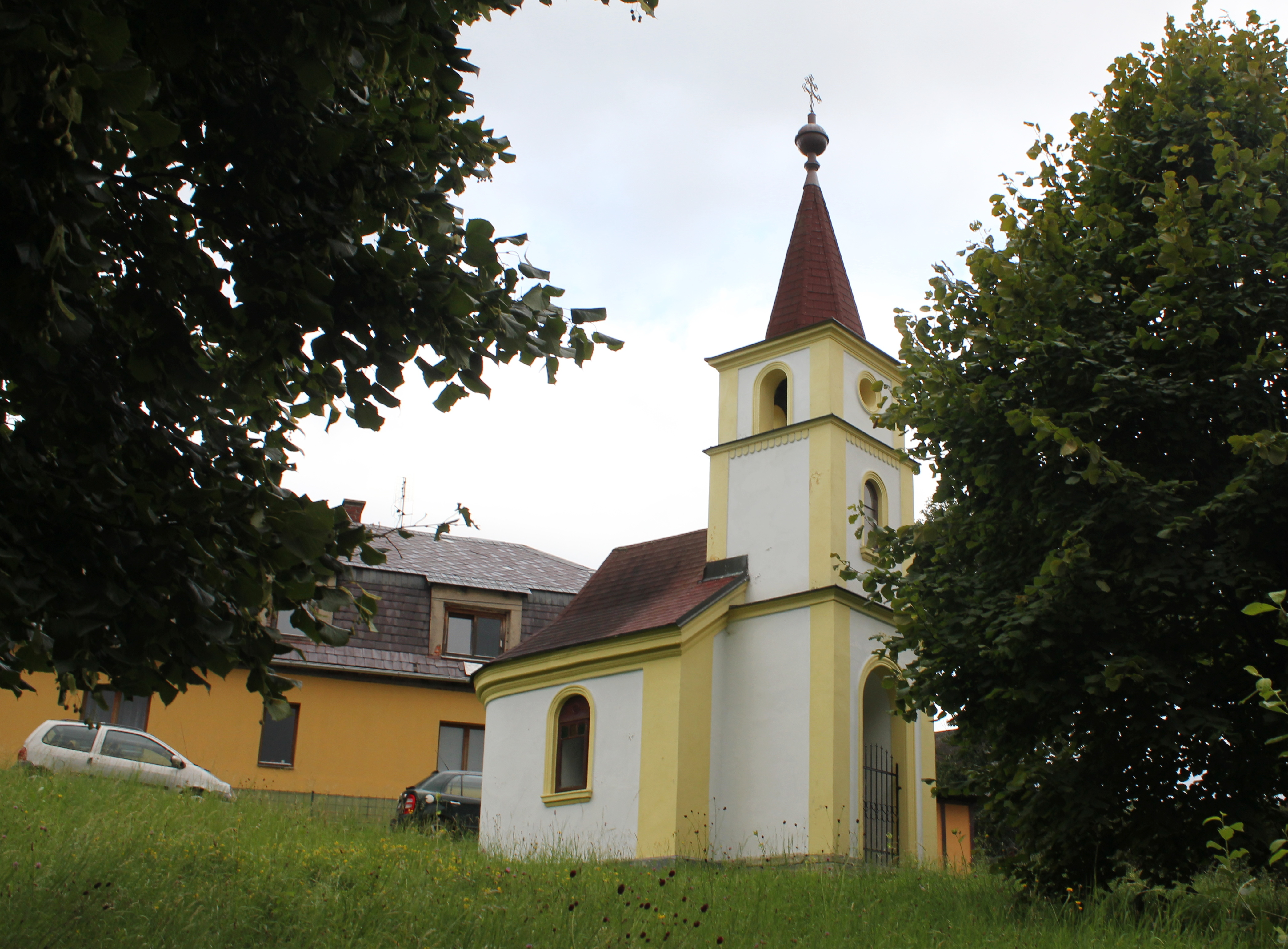 Kaple v Roudném